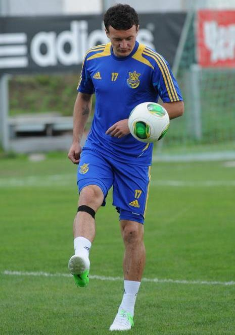 Артем Федецький - український футболіст у складі національної збірної.